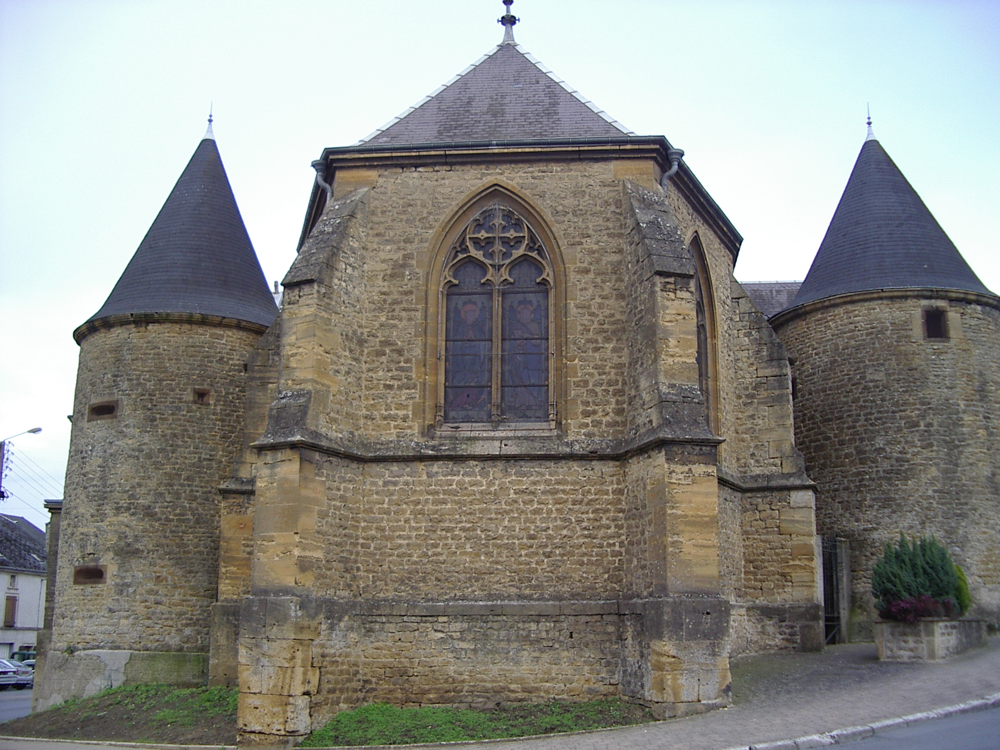 Eglise fortifiée de Vivier-au-Court-Ardennes-France